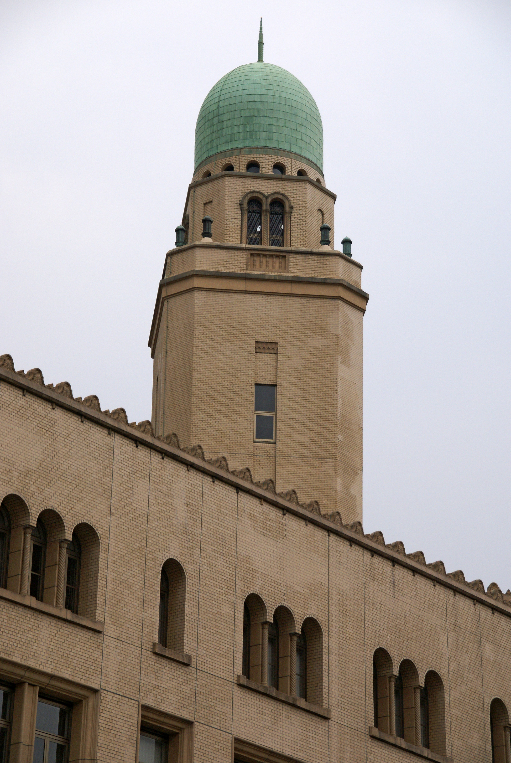 Yokohama Customs in Yokohama, Japan